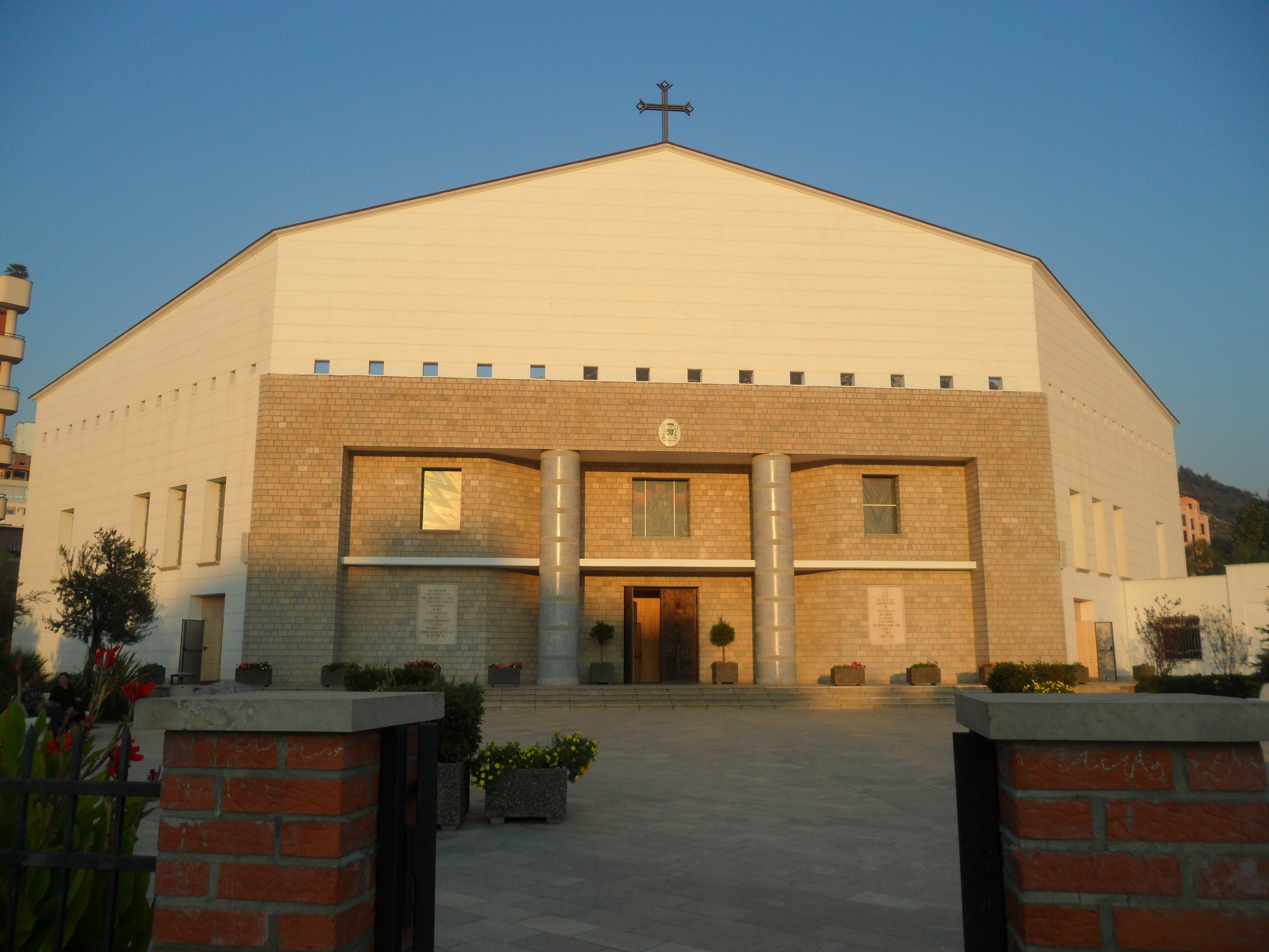 Katedralja e Shen Nikolles Lezhe